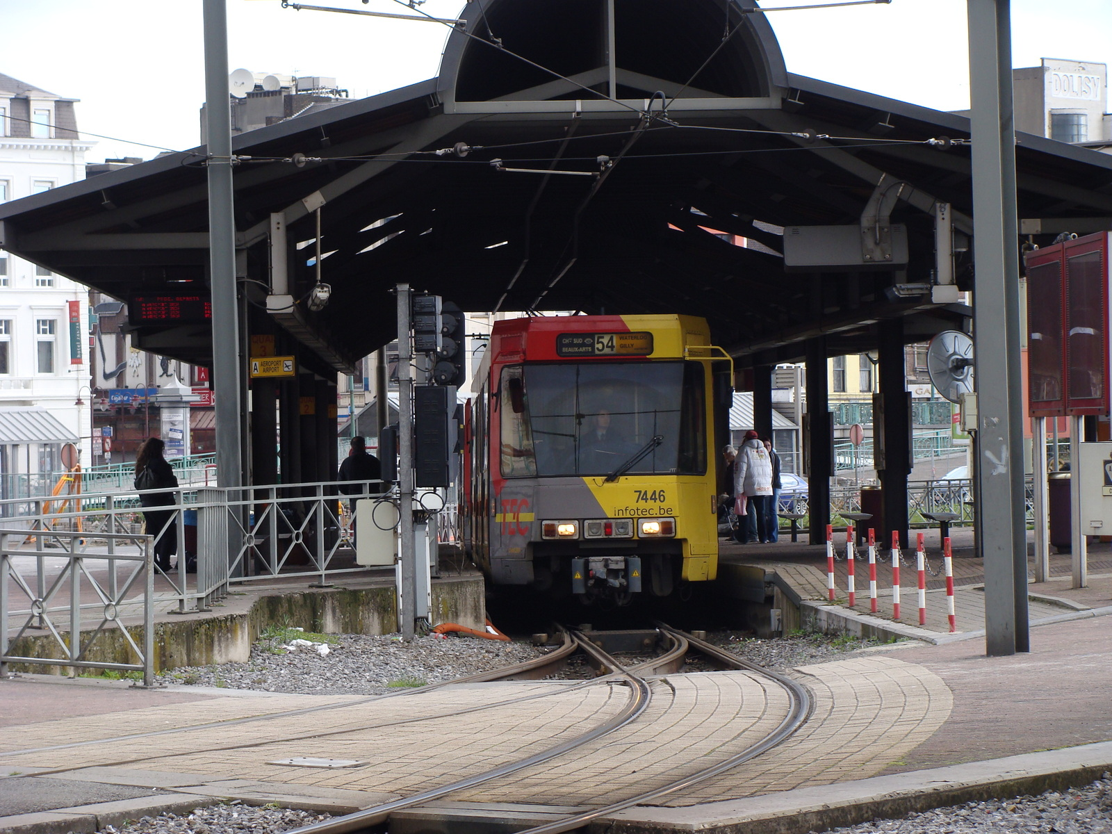 Métro 54 partant de la station Charleroi-Sud